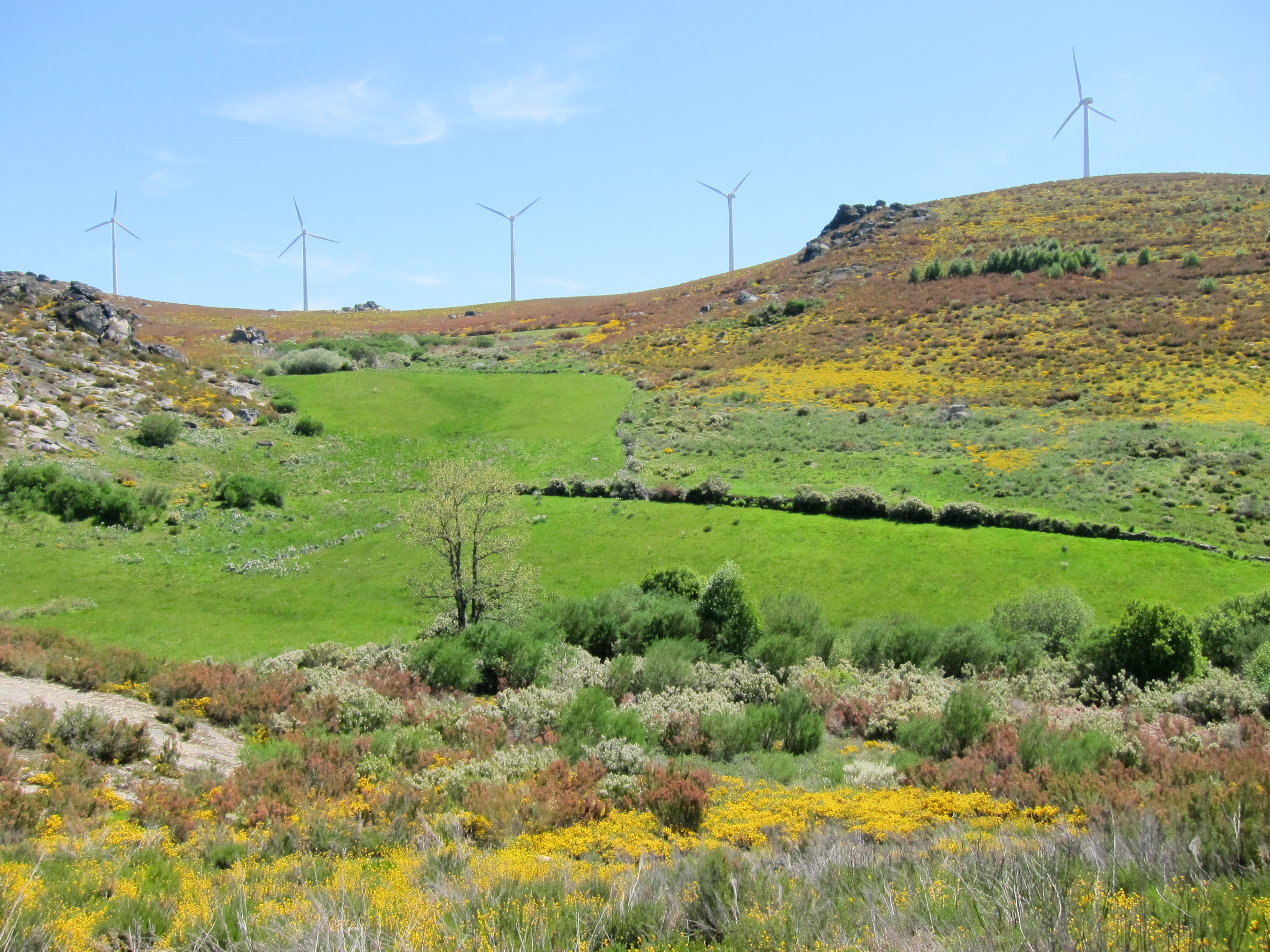 Lameiros and turbines in Parque Natural de Montesinho Porto Furado trail